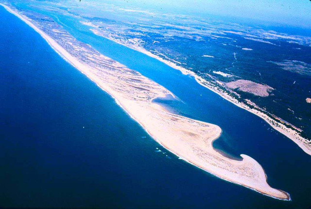 Flecha de El Rompido (Flecha de Nueva Umbría)